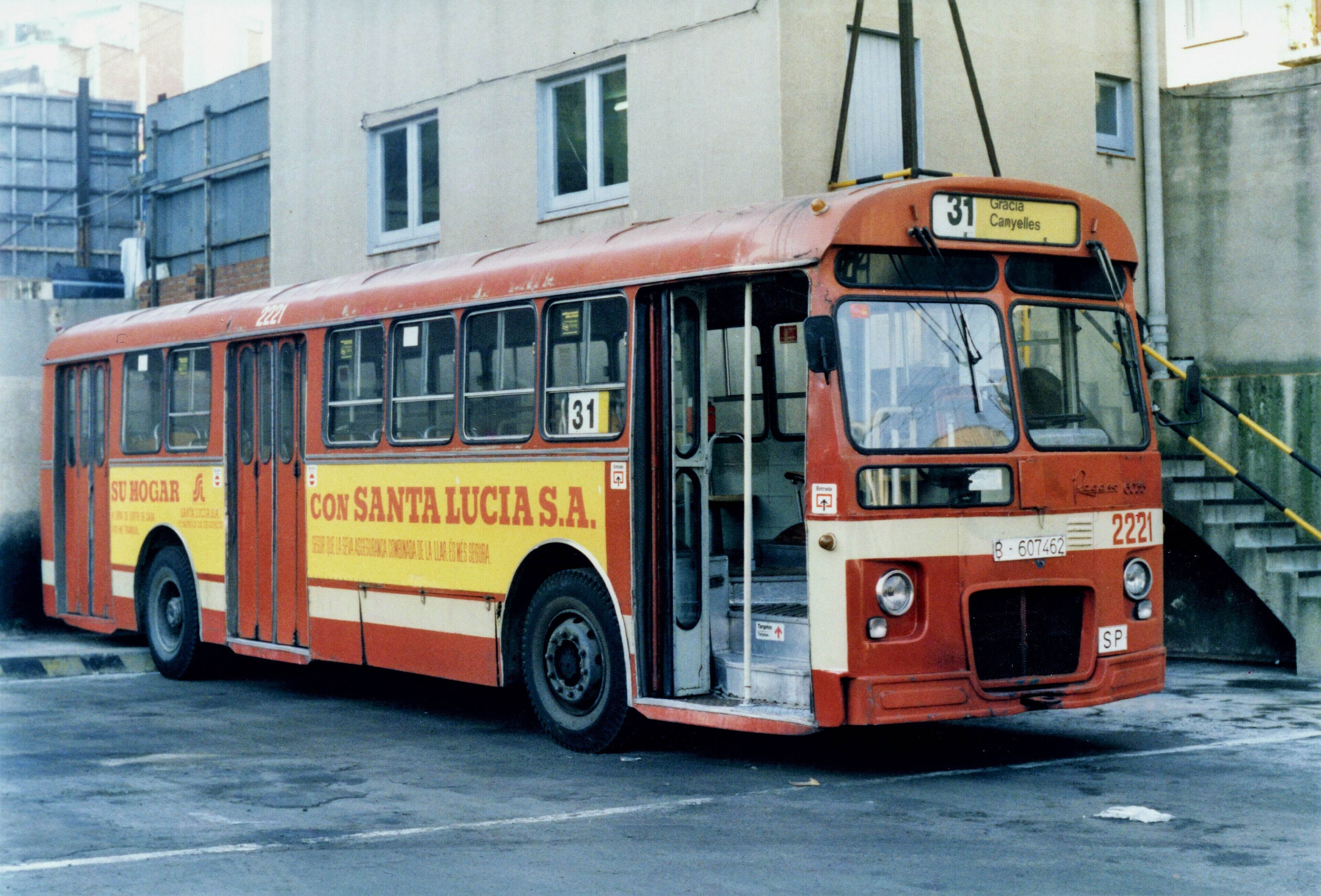 En el interior de las cocheras de Borbón, en Barcelona, el autobús Pegaso 6035 número 2221 de TMB. Lo vemos con los carteles de la línea 31.